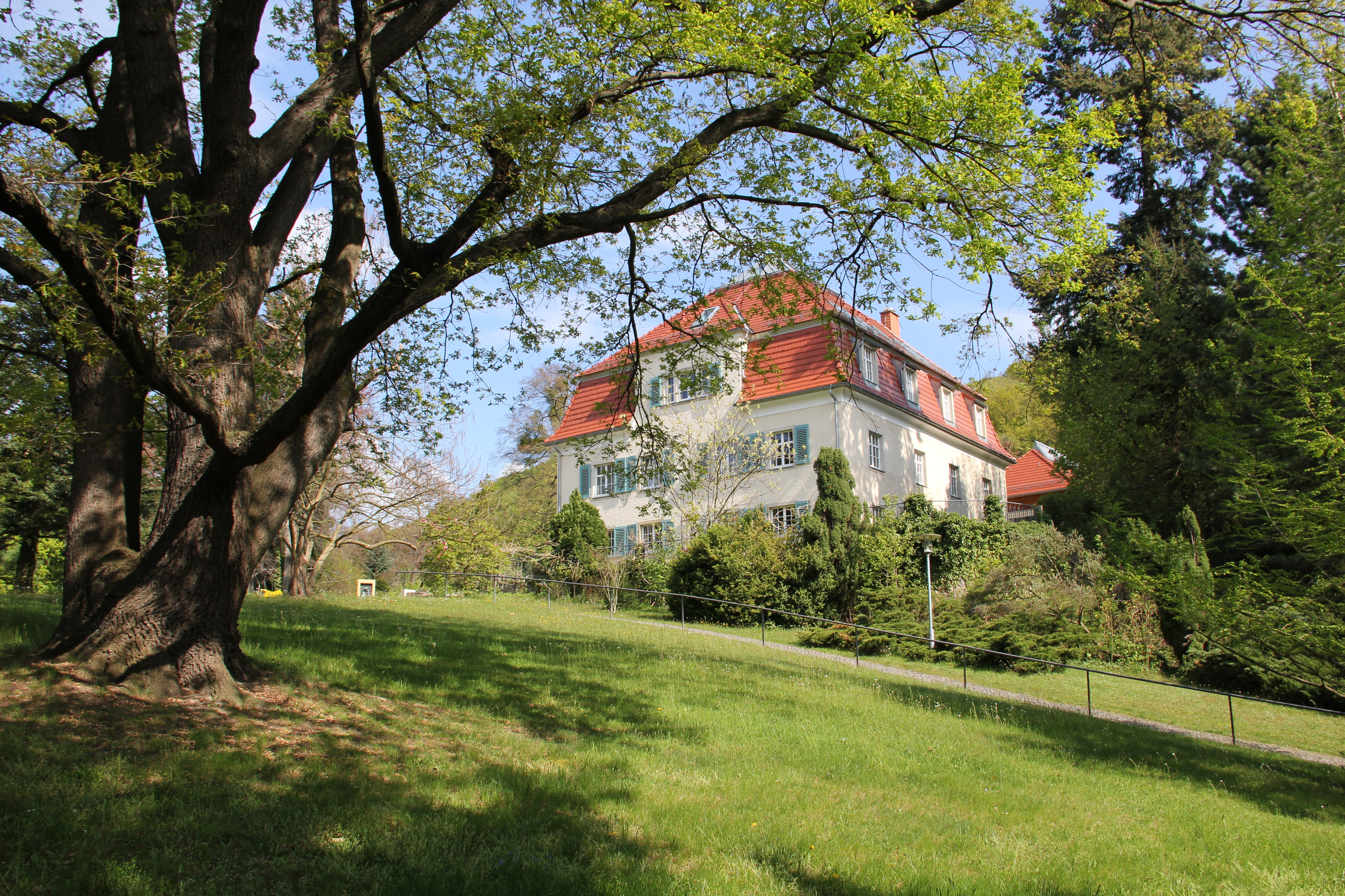 Blick von der Auffahrt auf das Gästehaus von Haus HohenEichen